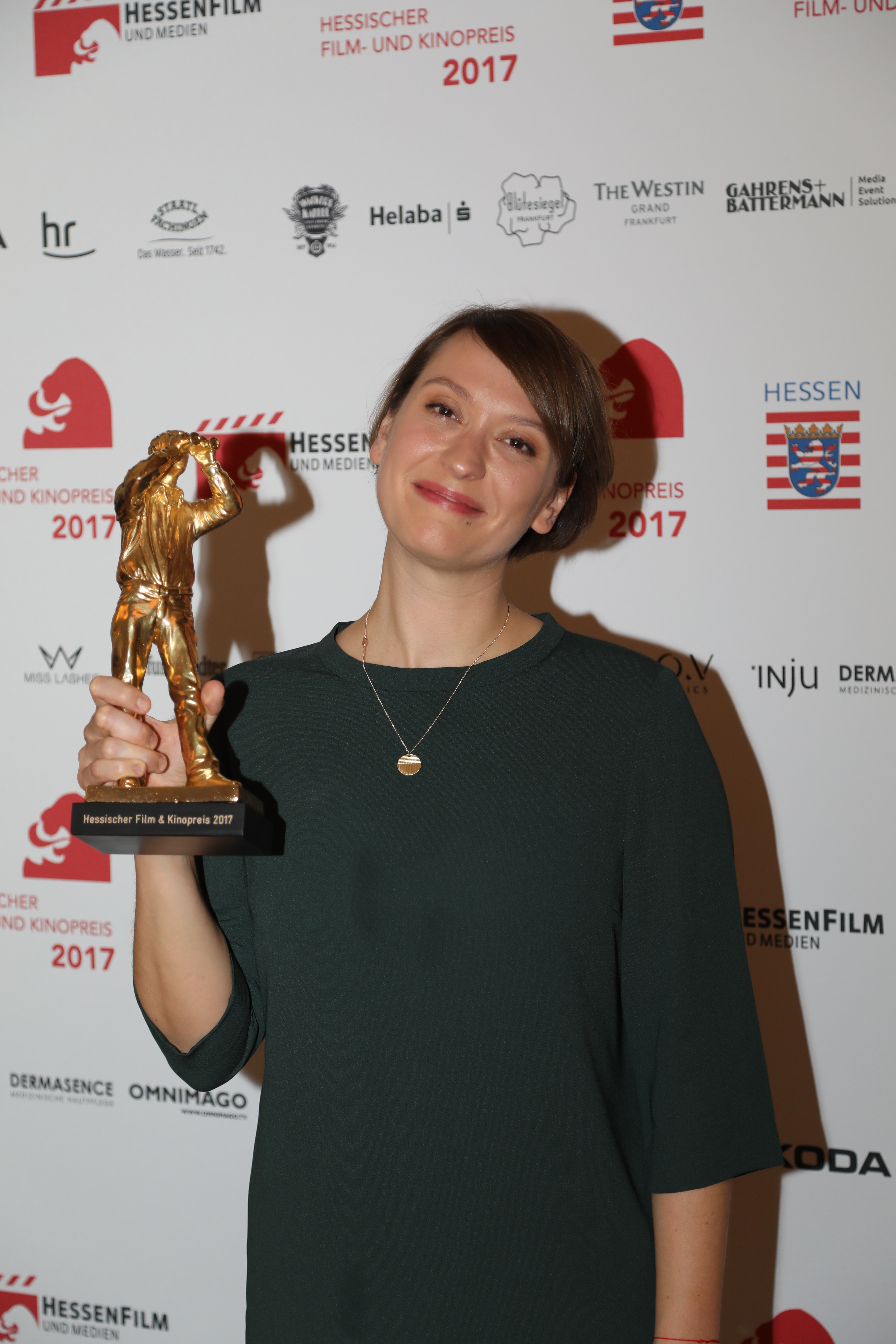 Teresa Hoerl beim Hessischen Film- und Kinopreis 2017